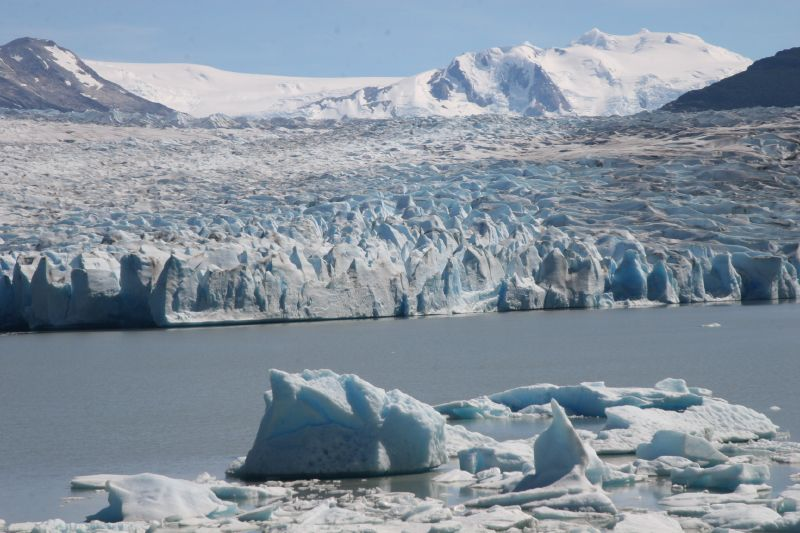 Glaciar Grey, Torres del Paine, Chile